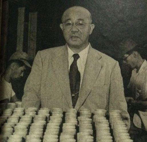 山本惣治（自動車製造・富士自動車創設者）